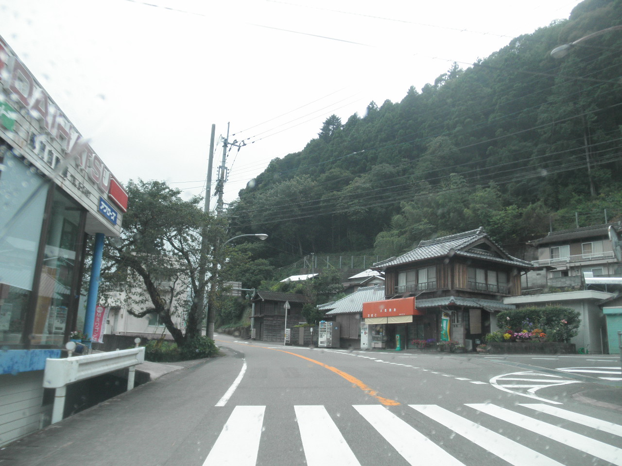 徳島県那賀郡那賀町鮎川大国 国道195号